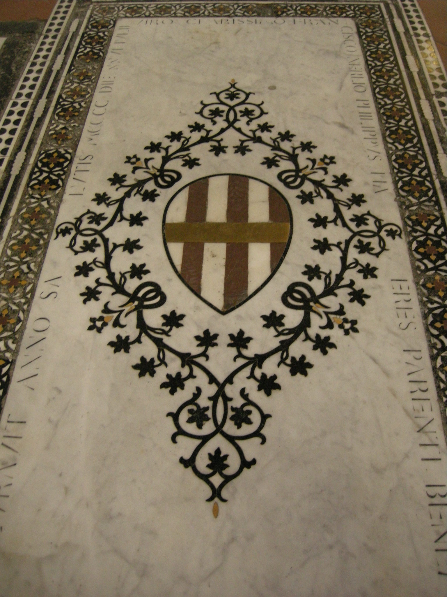 Transetto dx, stemma nerli